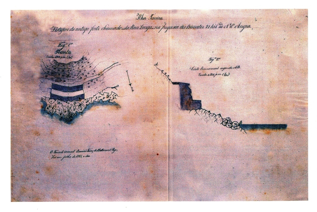 "Vestígios do antigo forte chamado da Rua Longa na freguezia dos Biscoutos...", Ilha Terceira (Açores), Portugal.